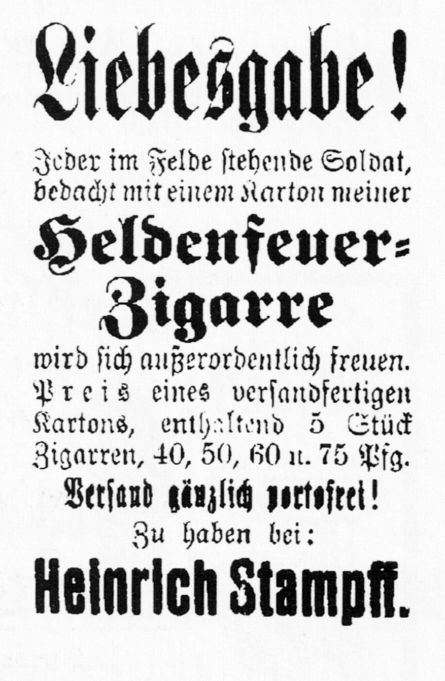 Zeitungsanzeige für die Spende der Heldenfeuerzigarre für die Soldaten im Ersten Weltkrieg in den Uetersener Nachrichten im August 1914 .